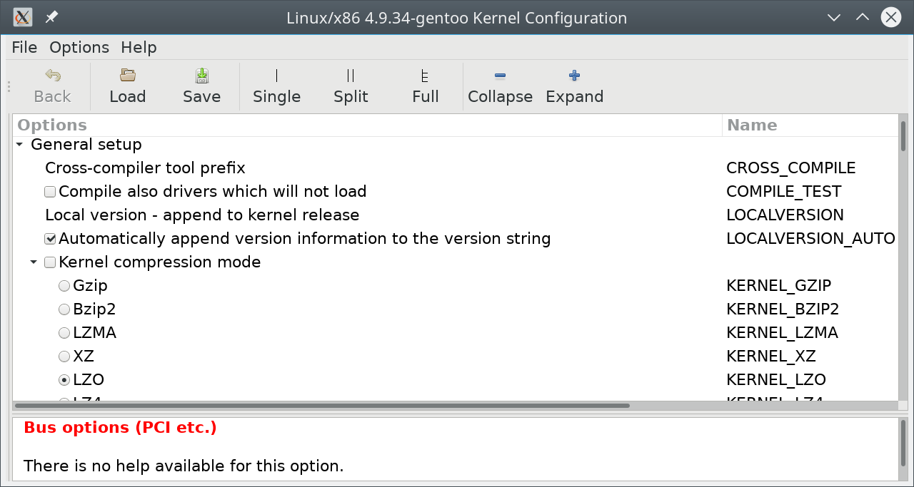 Gentoo Gtk+ kernel konfiguráció